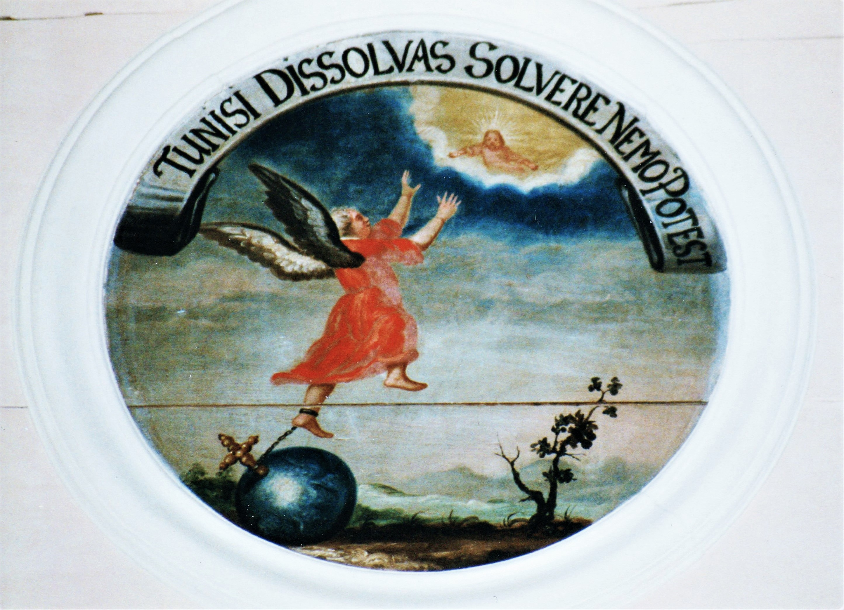 Schlosskirche Weilburg, auf Holz gemaltes Emblem: TU NISI DISSOLVAS SOLVERE NEMO POTEST (Wenn du dich nicht lösest, kann niemand dich lösen)